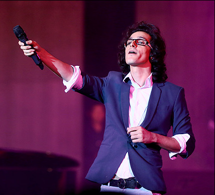 مرتضی پاشایی در جشنواره موسیقی مقاومت